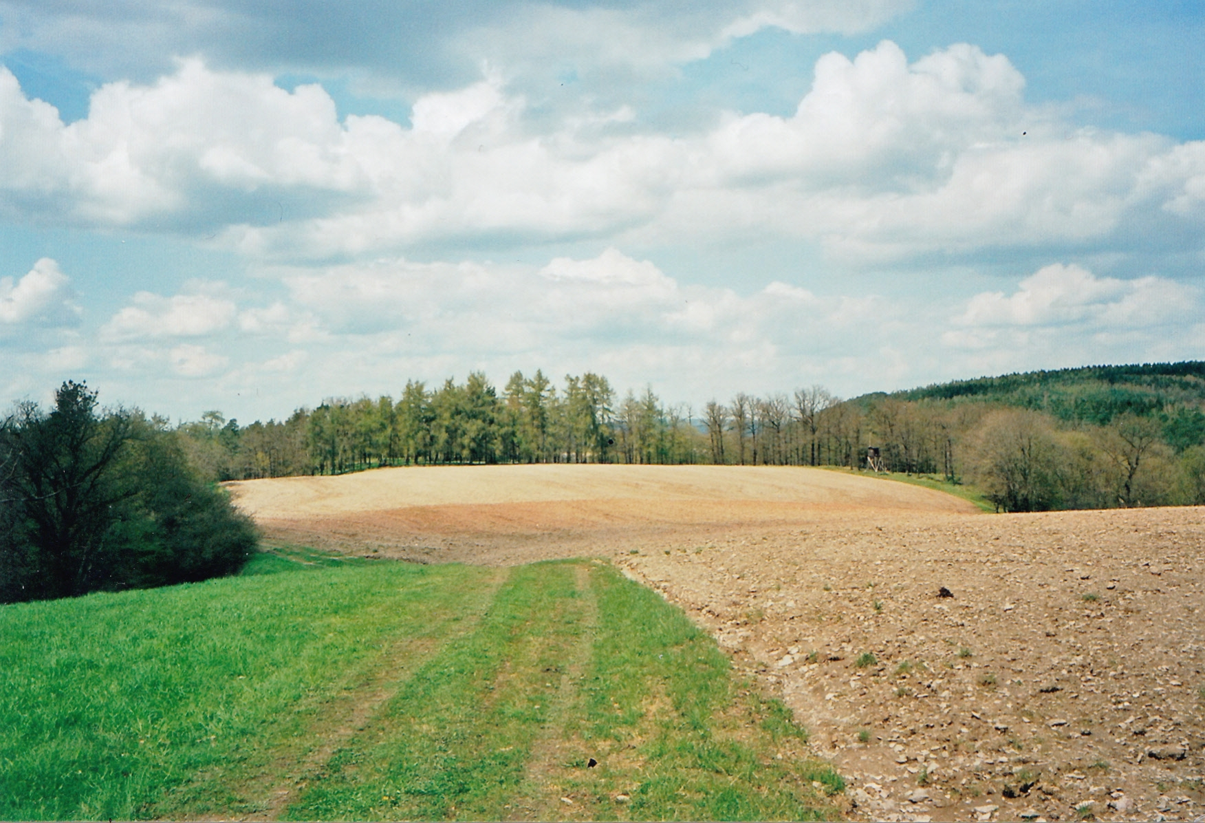 Abschnittswall 207 Meter